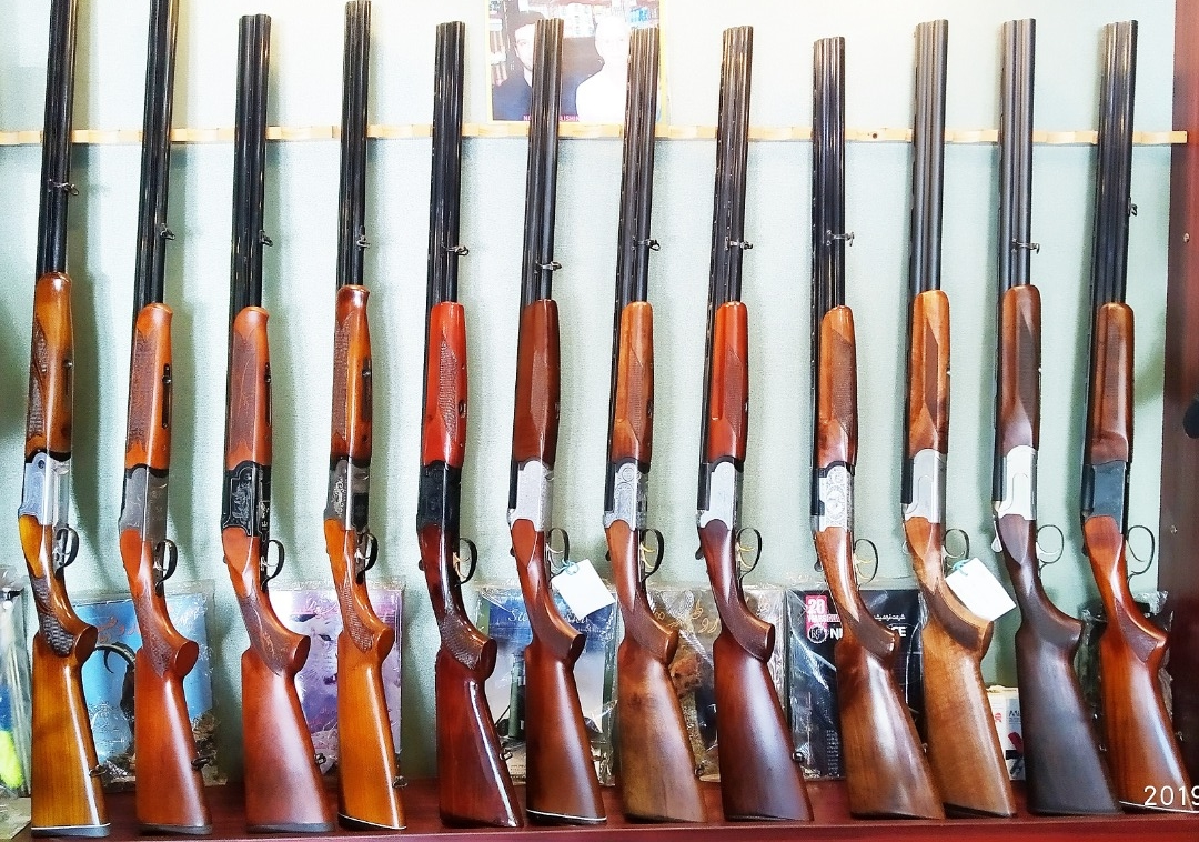 برخی از سلاحهای ساچمه زنی